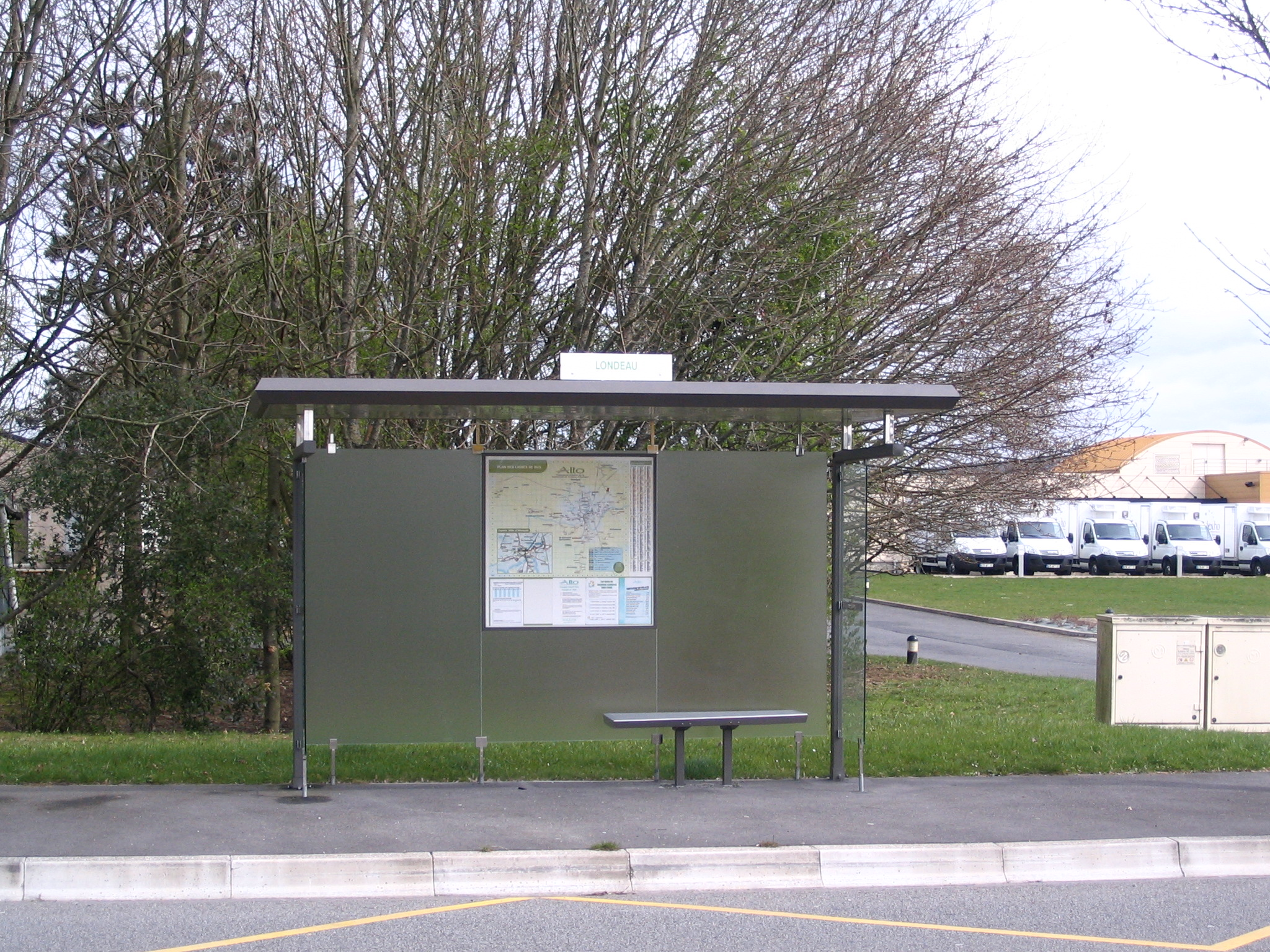 Abribus Alto Alençon, Orne, France , Europe